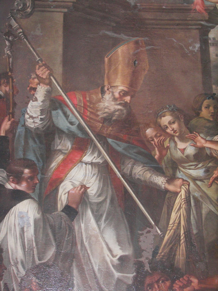 San Leone Taumaturgo che sconfigge il mago Eliodoro. Olio su tela del secolo XVIII di Matteo Desiderato. Chiesa Madre di Santa Maria di Licodia.